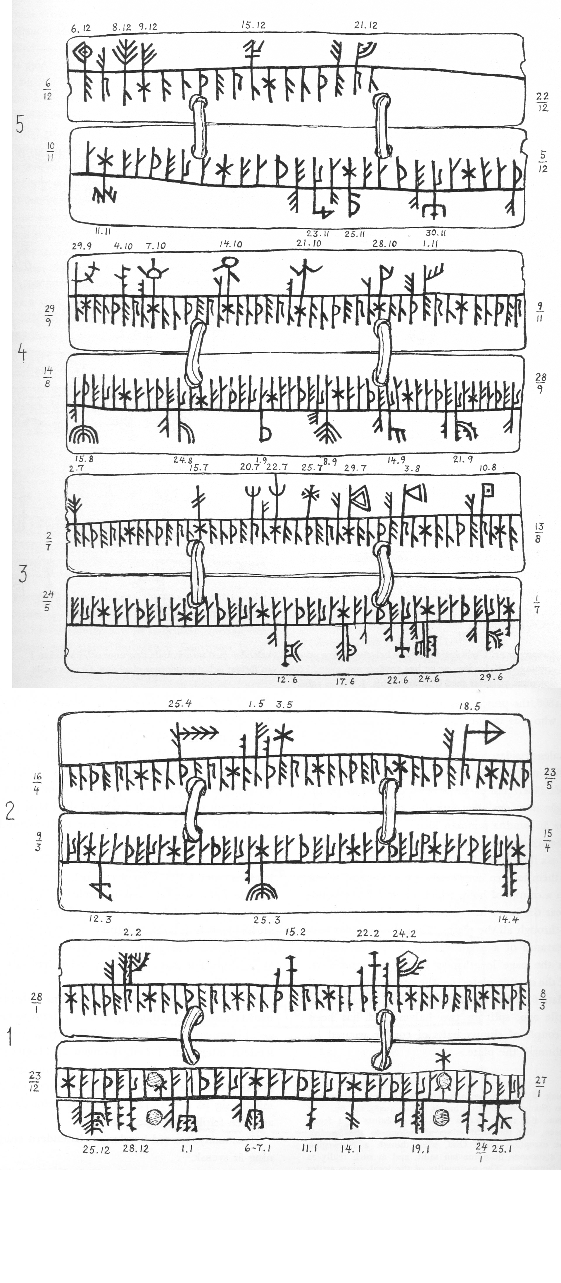 Samischer Runenkalender. Es ist der erste samische Runenkalender, der wissenschaftlich beschrieben wurde. Eiríkr Magnússon veröffentlichte die Untersuchung in der Arbeit On a Runic Calendar Found in Lapland in 1866. Cambridge 1877 Der Kalender befand sich im Pitt-Rivers-Museum (Farnham-Blandford, Dorset, war aber zur Zeit, als das Buch Lapska ben- och Träkalendar geschrieben wurde, unzugänglich. Die Sammlung befindet sich heute im Pitt Rivers Museum in Oxford. Der Kalender besteht 5 Platten mit 10 Seiten und einer Deckplatte. Er wird von unten nach oben gelesen. Auf dem Foto ist zu unterst eine Seite der Platte 1, darüber die 2. Seite der Platte 1, darüber eine Seite der Platte 2 und darüber eine Seite der Platte 5. Der Kalender beginnt mit 23. Dezember, hat 52 Wochen mit 364 Tagesrunen. Granlund meint, dass der 6. und 7. Januar zu einem Doppeltag gemacht wurde, so dass auf diese Weise 365 Tage zustande kamen.